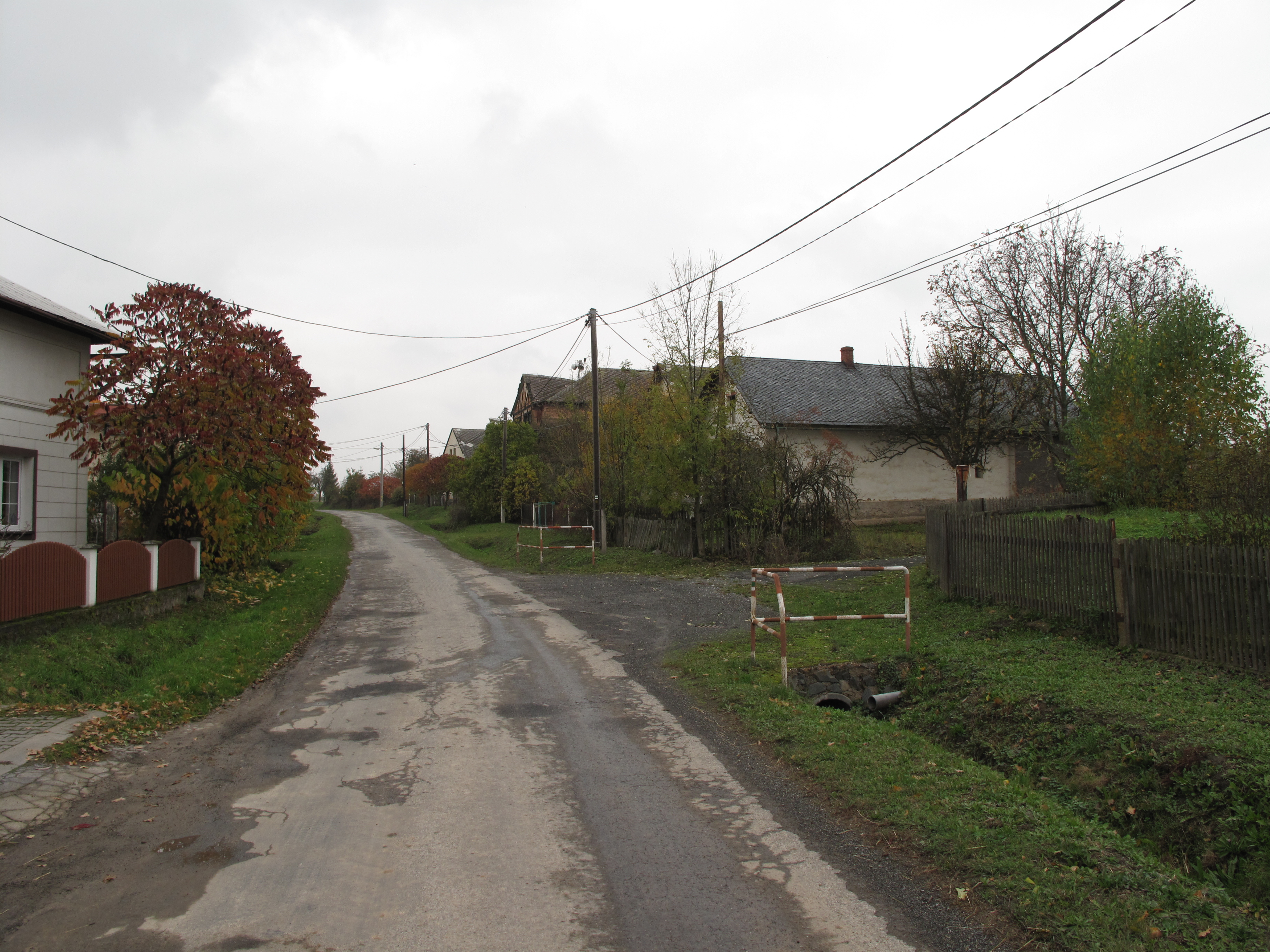 Karlov (Bohušov). Okres Bruntál, Česká republika.